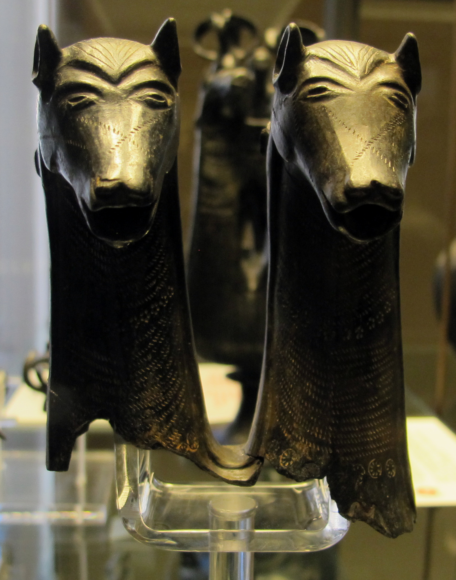 Museo Gregoriano Etrusco